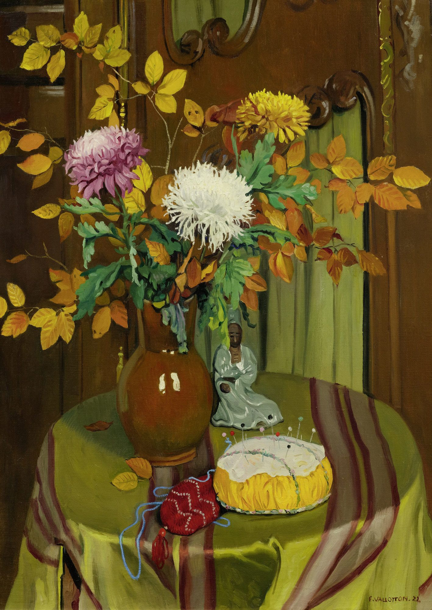 Chrysanthèmes et feuillage d'automne. 1922. Öl auf Leinwand. 92 x 73 cm. Unten rechts signiert und datiert: F. VALLOTTON. 22.